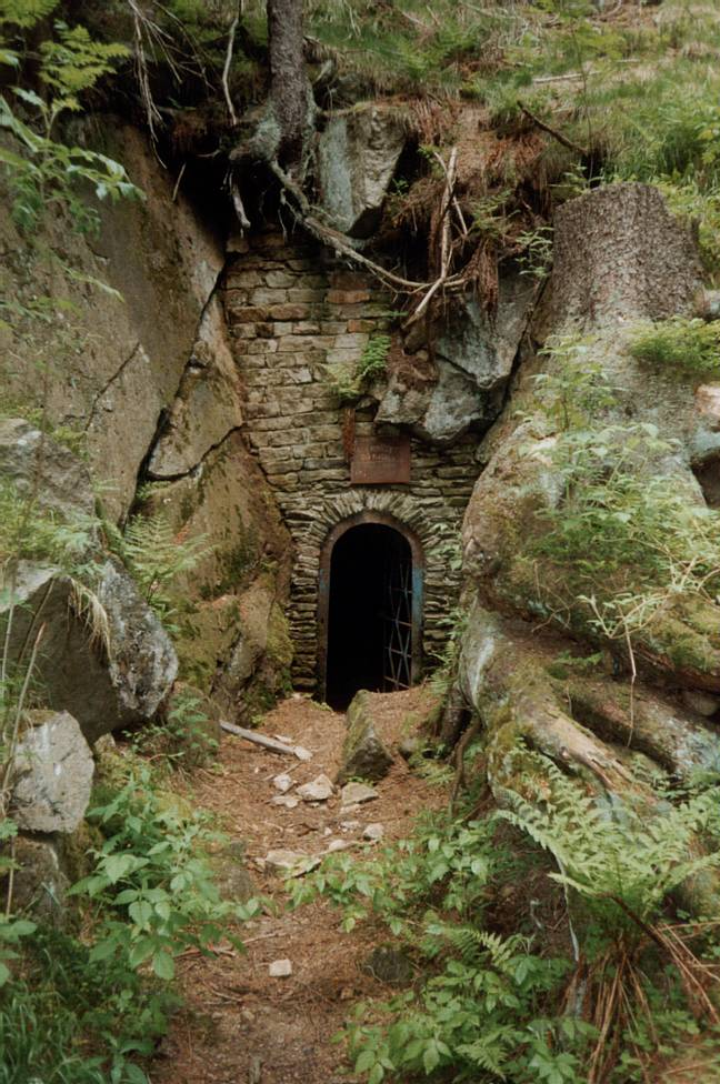 Stollenmundloch des Tiefen Steitpingenstolln im Schwarzwassertal